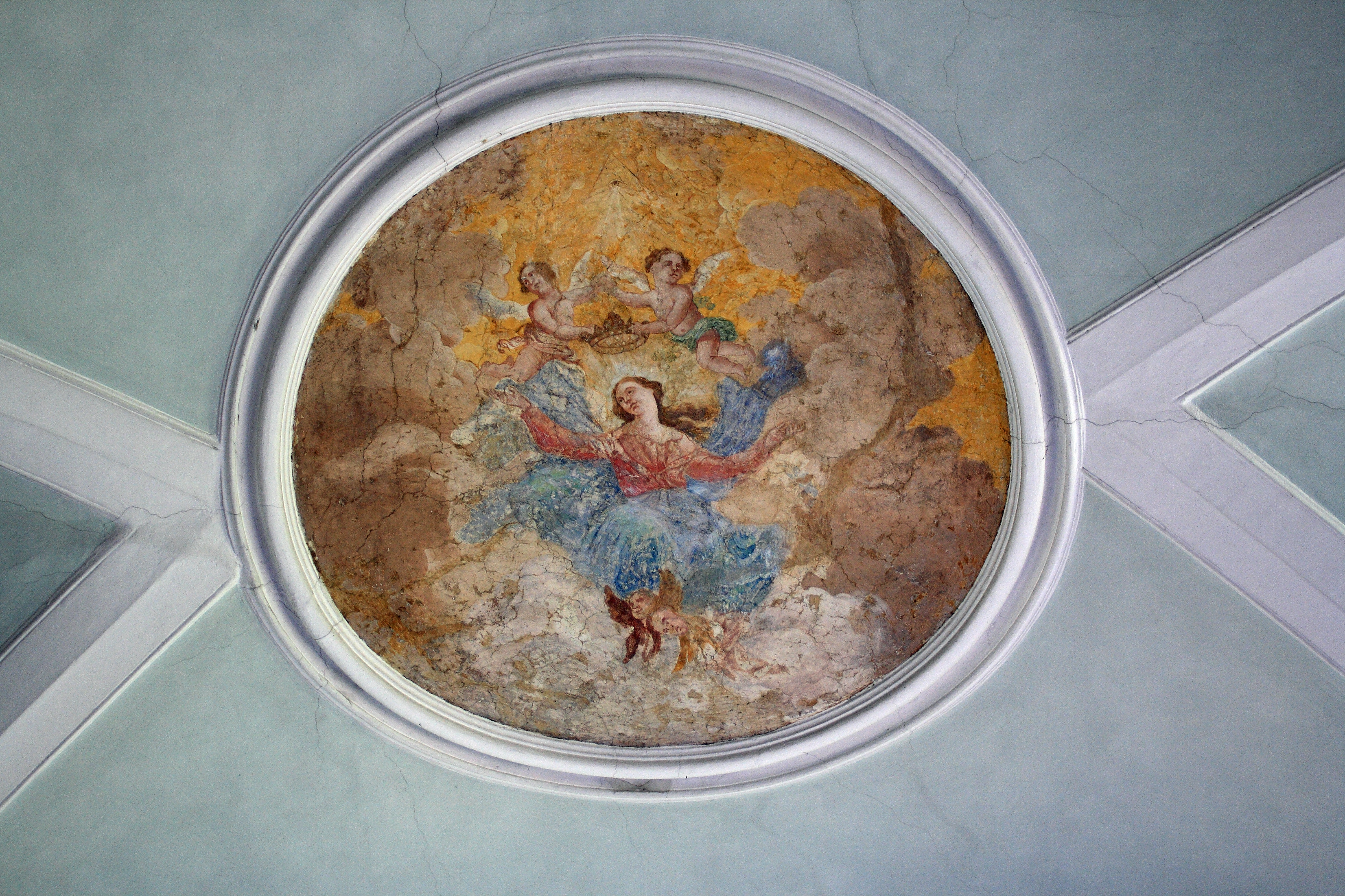 Deckenfresko in der Leonsteiner Pfarrkirche